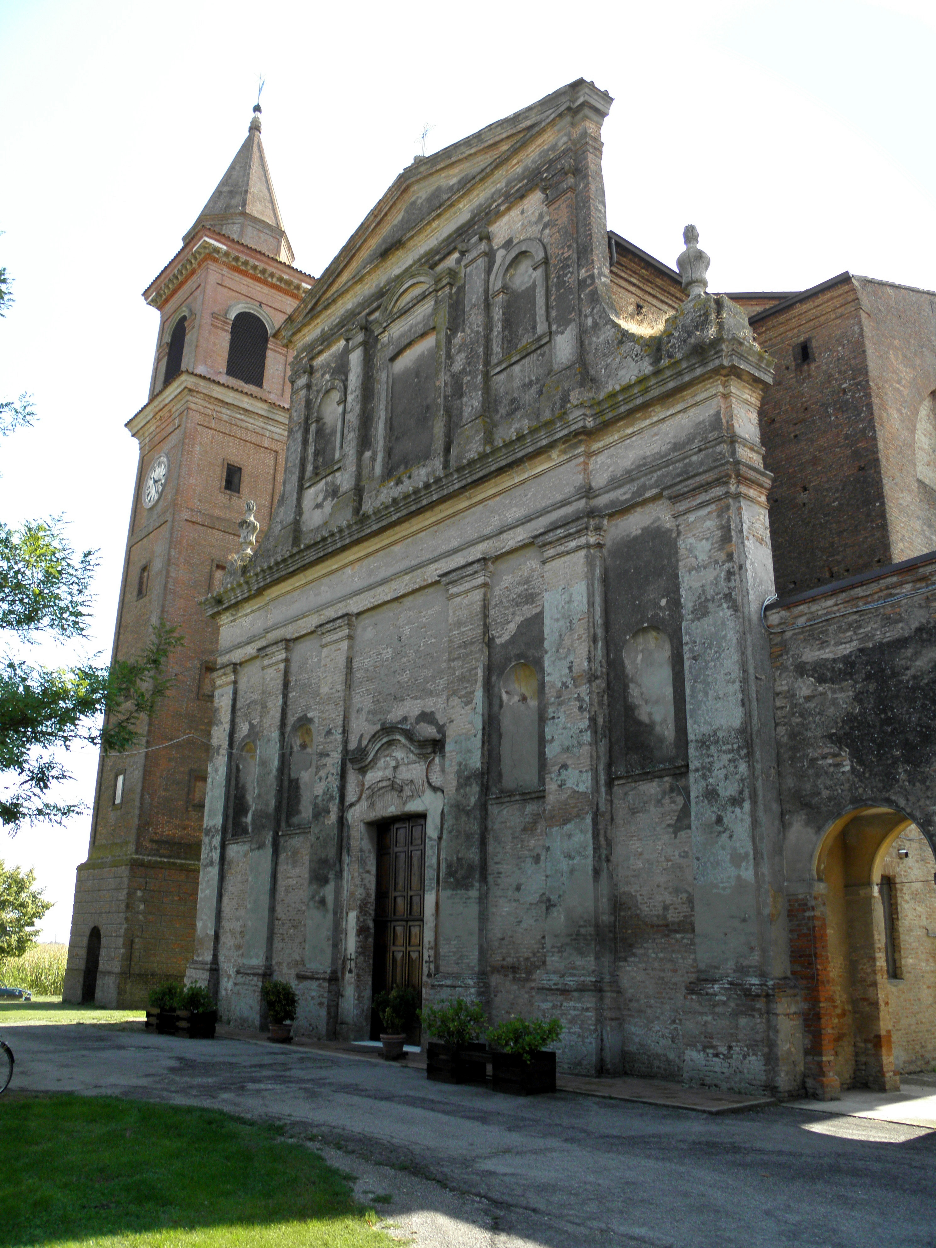 Ruina, frazione di Ro: la facciata della chiesa parrocchiale di San Martino Vescovo.